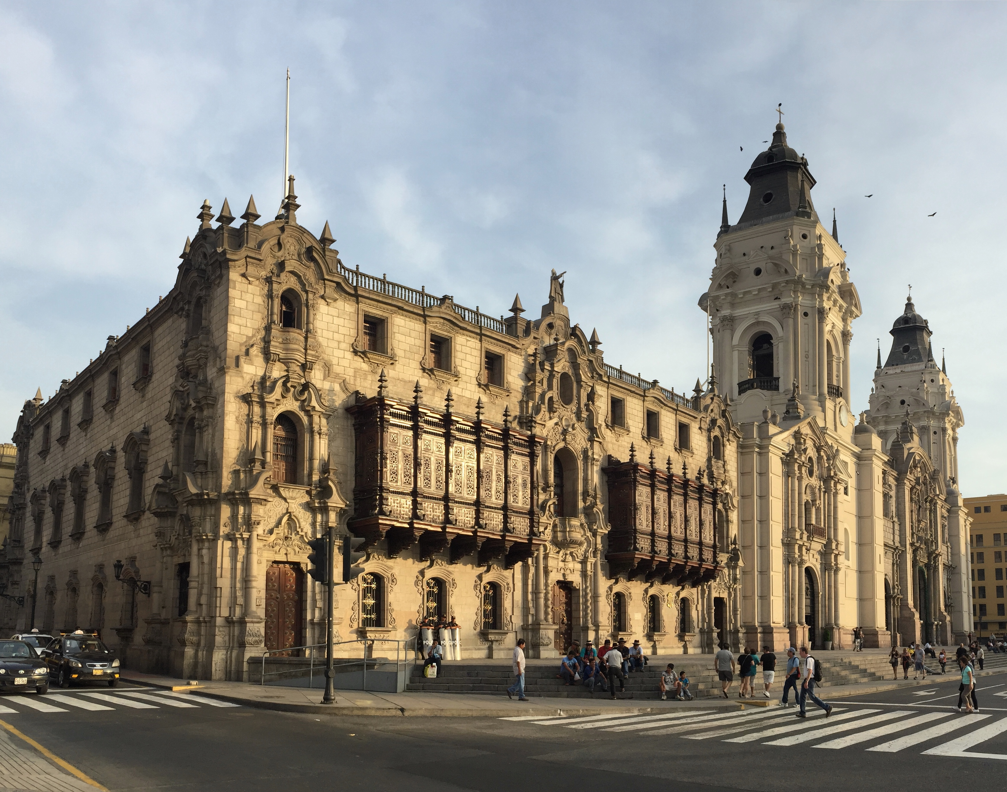 El 11 de marzo de 1540, cinco años después de fundada la ciudad de Lima, se inauguró la primera iglesia levantada por Francisco Pizarro. El 14 de mayo de 1541 fue elegida en Catedral por Pablo III y en Iglesia Metropolitana en 1546. Uno de los momentos más importantes en su historia fue la visita del Papa Juan Pablo II el 1ero de febrero de 1985, en que por primera vez un sucesor de Pedro estuvo en ella.